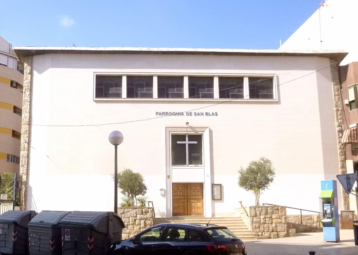 Alicante - Iglesia de San Blas